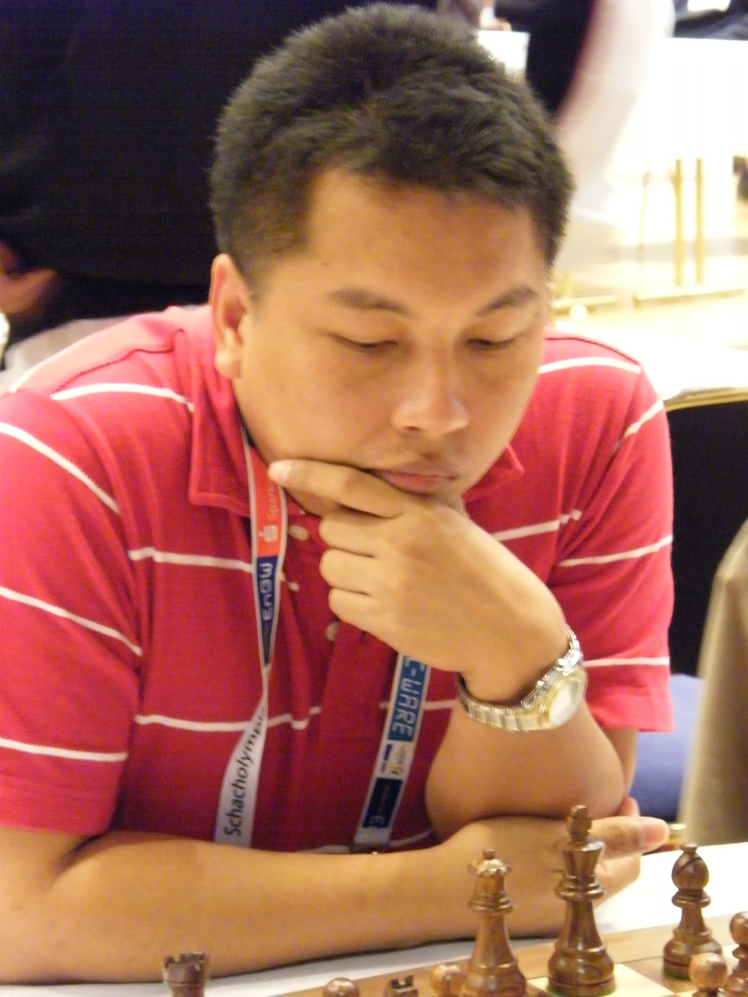 GM Jayson Gonzales bei der Schacholympiade 2008 in Dresden